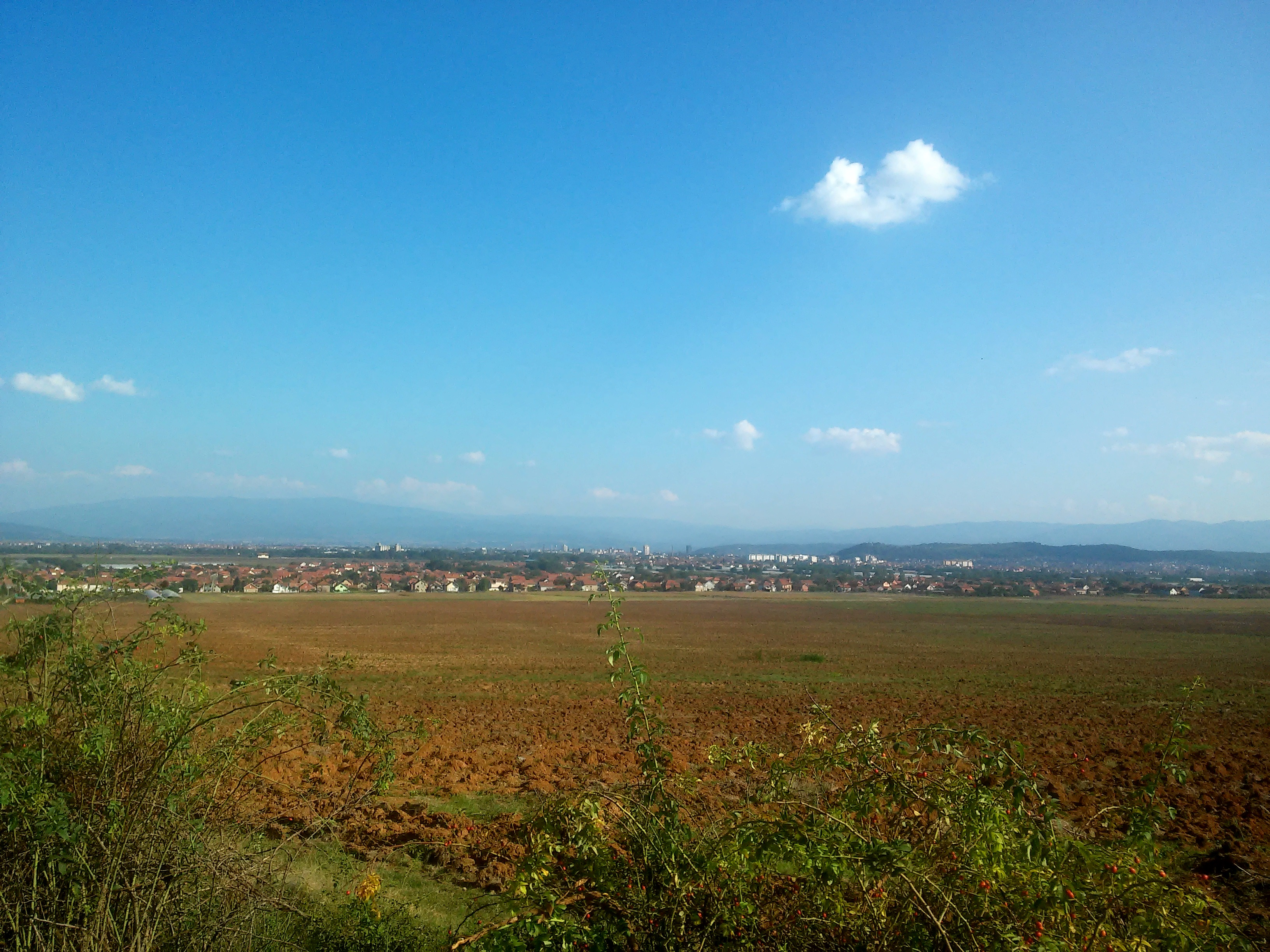 Leskovac